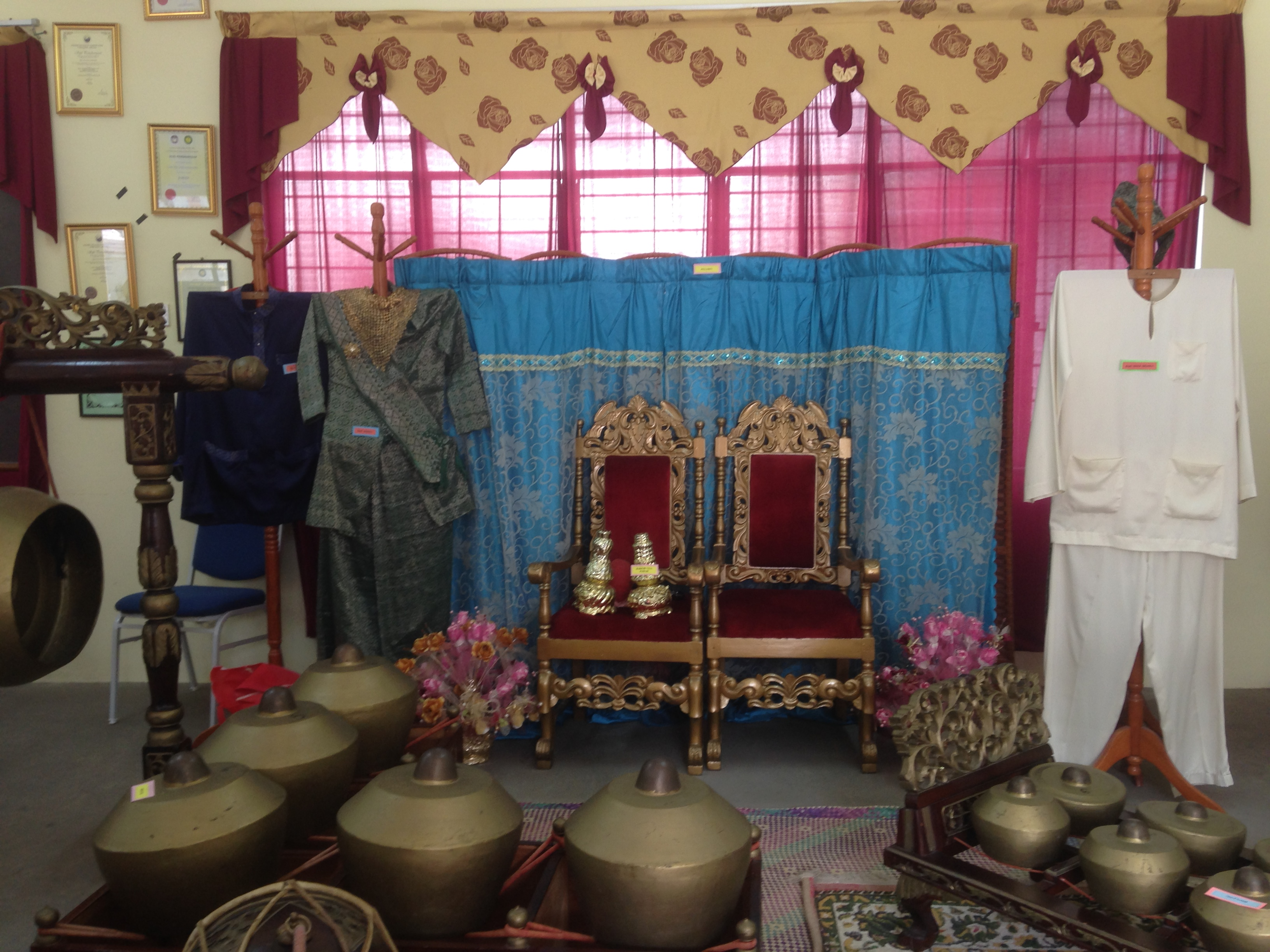 PELAMIN